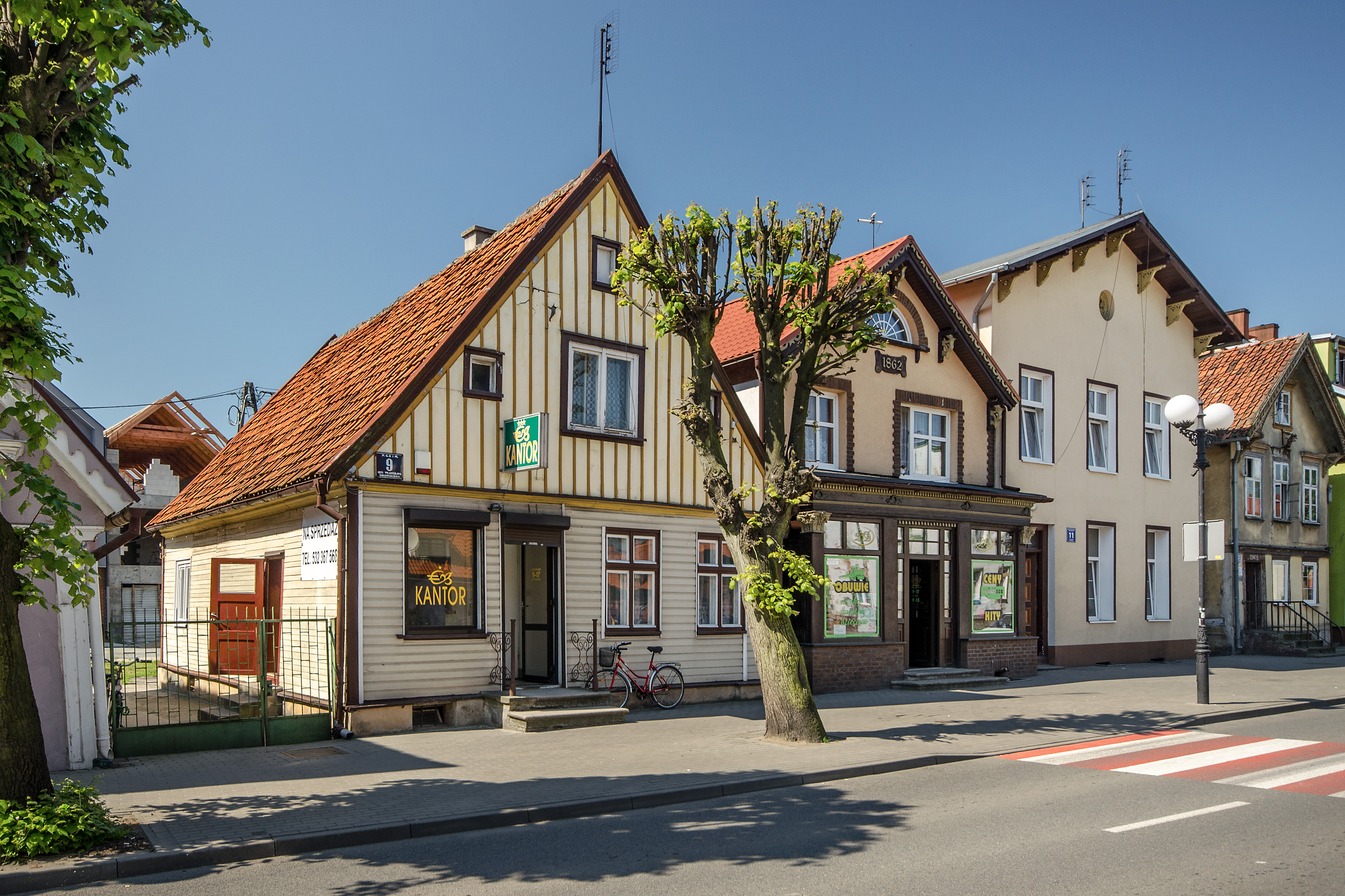 Nowy Dwór Gdański, dom, kon. XIX